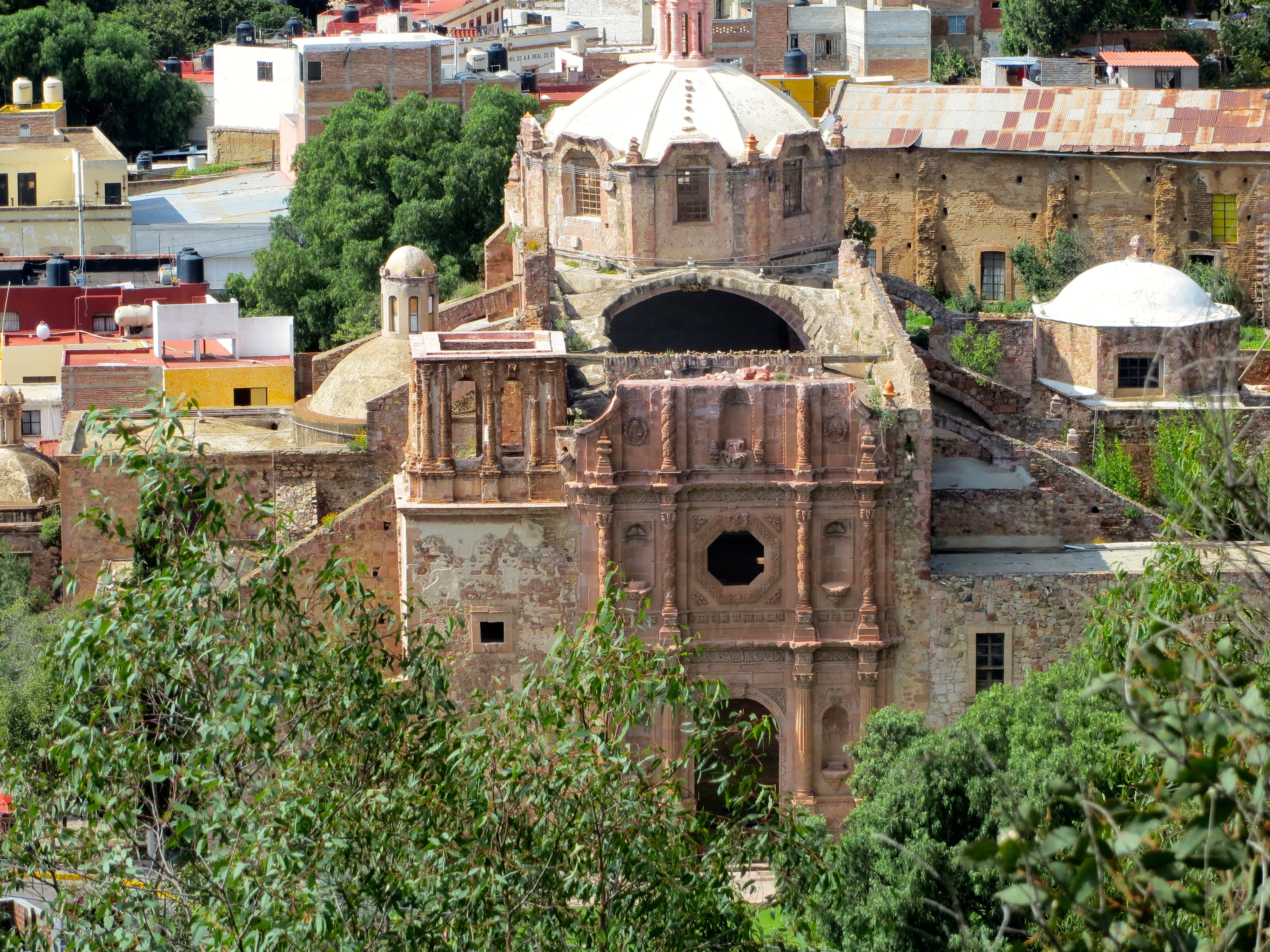 Las ruinas del ex-convento S. Francisco de Asis